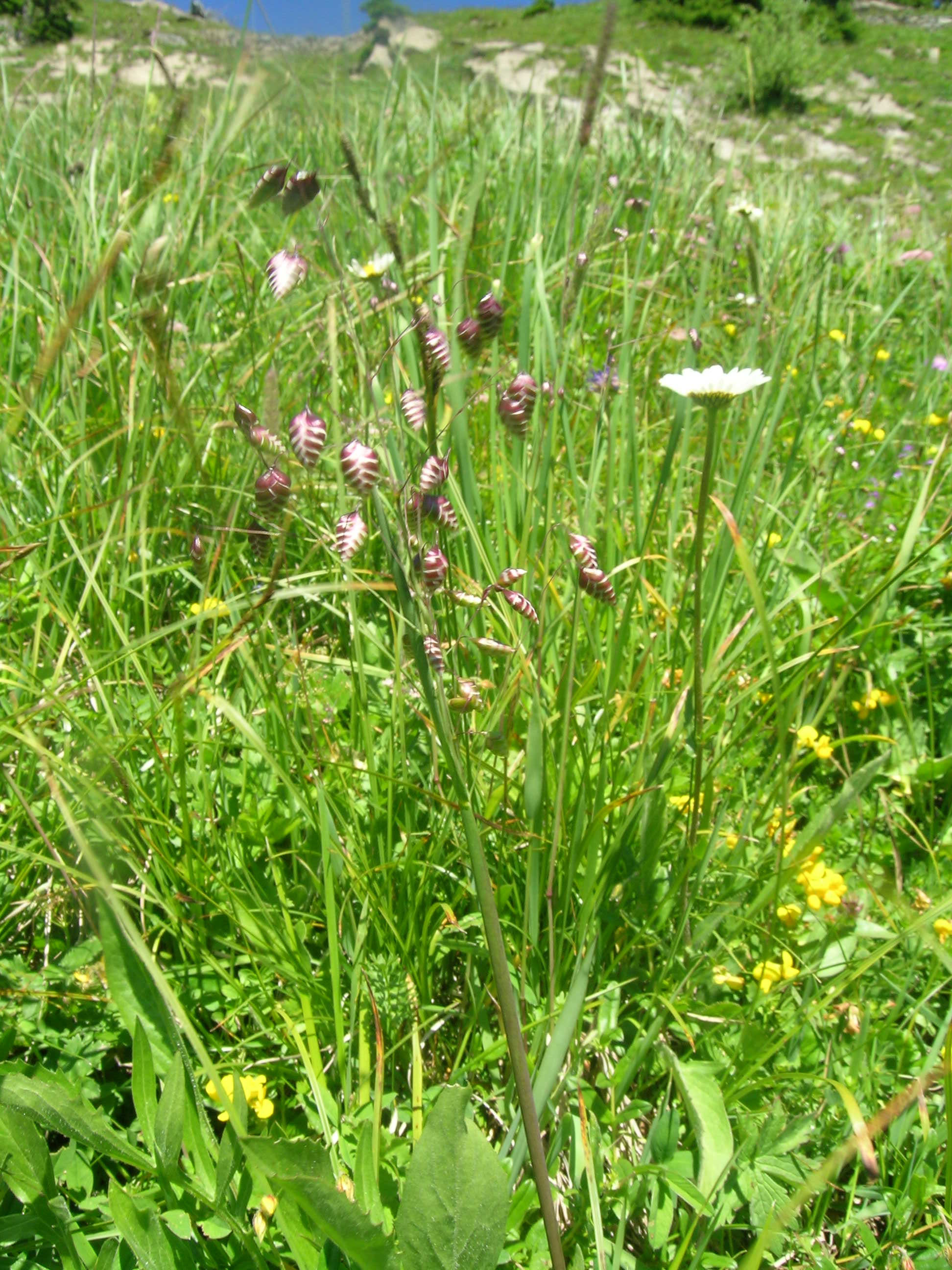 Gemeines Zittergras (Briza media), Schynige Platte, Kanton Bern, Schweiz